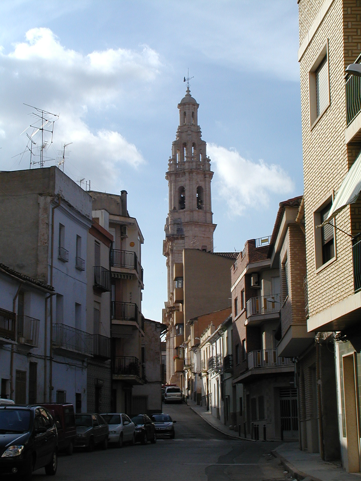 foto StaraBlazkova 2004